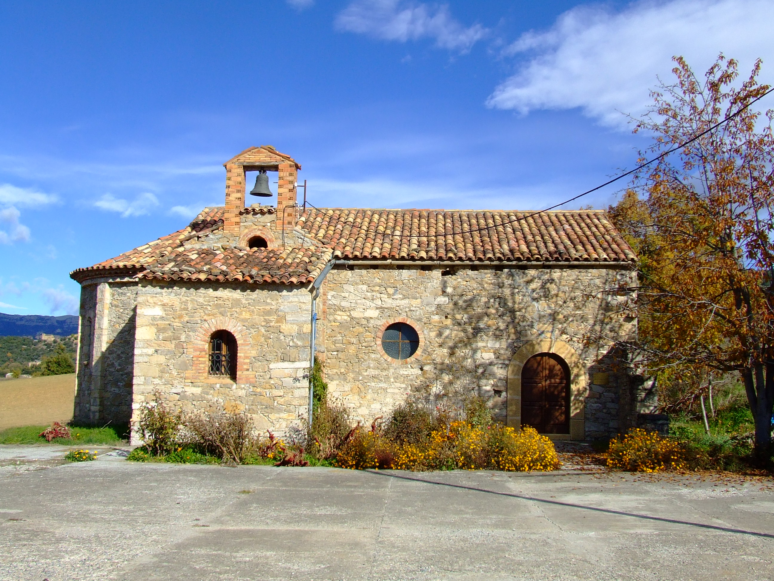 L'església parroquial nova de Biscarri (Benavent de la Conca, Isona i Conca Dellà, Pallars Jussà)